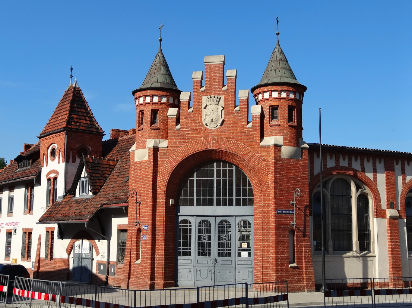 Miejska hala targowa w Bydgoszczy przy ul. Podwale zbud. 1906 r